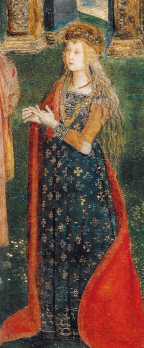 Disputa di Santa Caterina d'Alessandria con i filosofi, davanti all'imperatore Massimino (particolare): «È molto probabile che ci si possa far l'idea di come apparisse Lucrezia [...] guardando la Santa Caterina della Disputa pinturicchiesca [...] ritenuta per tradizione il ritratto, magari idealizzato, della figlia di Alessandro VI: una figura di adolescente incappucciata di capelli d'oro, lunghissimi, dall'espressione tra l'assorta e intenta come di chi si affaccia a guardare la vita; ed è vero che qualche cosa in lei si fa chiamare con il nome di Lucrezia, irresistibilmente. [...] L'esilità mansueta della figura, la sua compostezza un poco rigida fra la gente intorno mossa in atteggiamenti snodati, sono proprie di una bimba cresciuta troppo presto e troppo presto chiamata alla pompa delle vesti da grande, abito di velluto rosso e manto azzurro, tessuti sontuosi, quasi impropri alla sua acerbità. Voglio dire che, se non è questo il suo ritratto dal vero, è di sicuro per noi l'allegoria di Lucrezia [...].» (Maria Bellonci, Lucrezia Borgia, Milano, 2003)